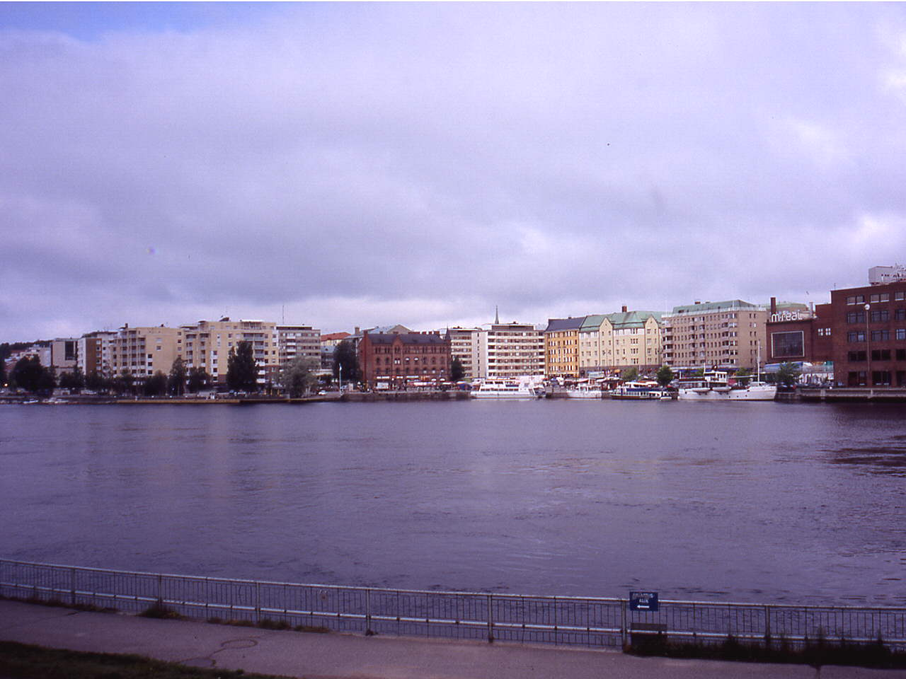 Blick auf den Laukontori in Tampere, 6. Juli 2004.